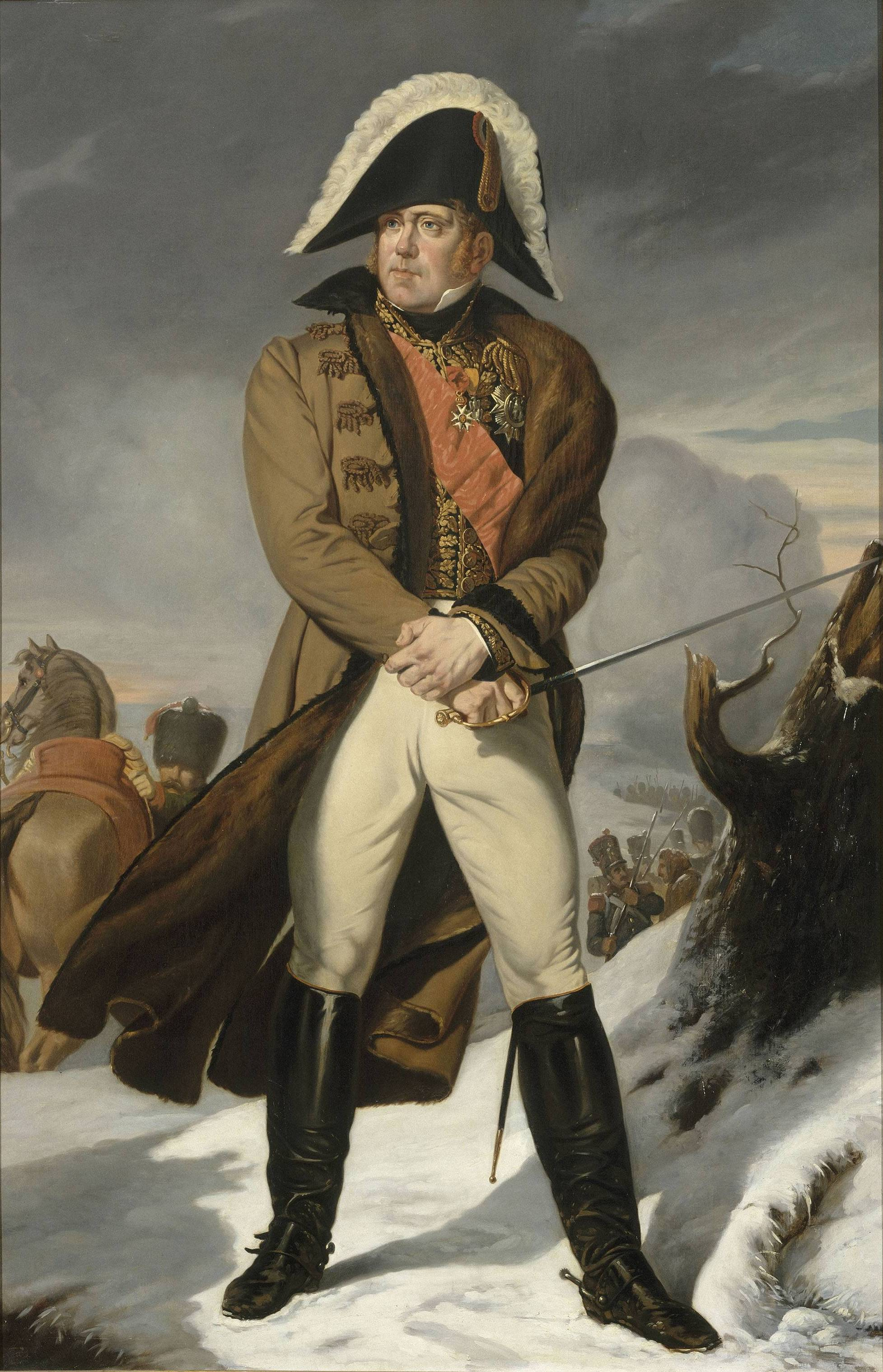 Copie d'après un original de Langlois commandé par Napoléon Ier pour la salle des maréchaux au palais des Tuileries à Paris ; détruit dans l'incendie de 1871.